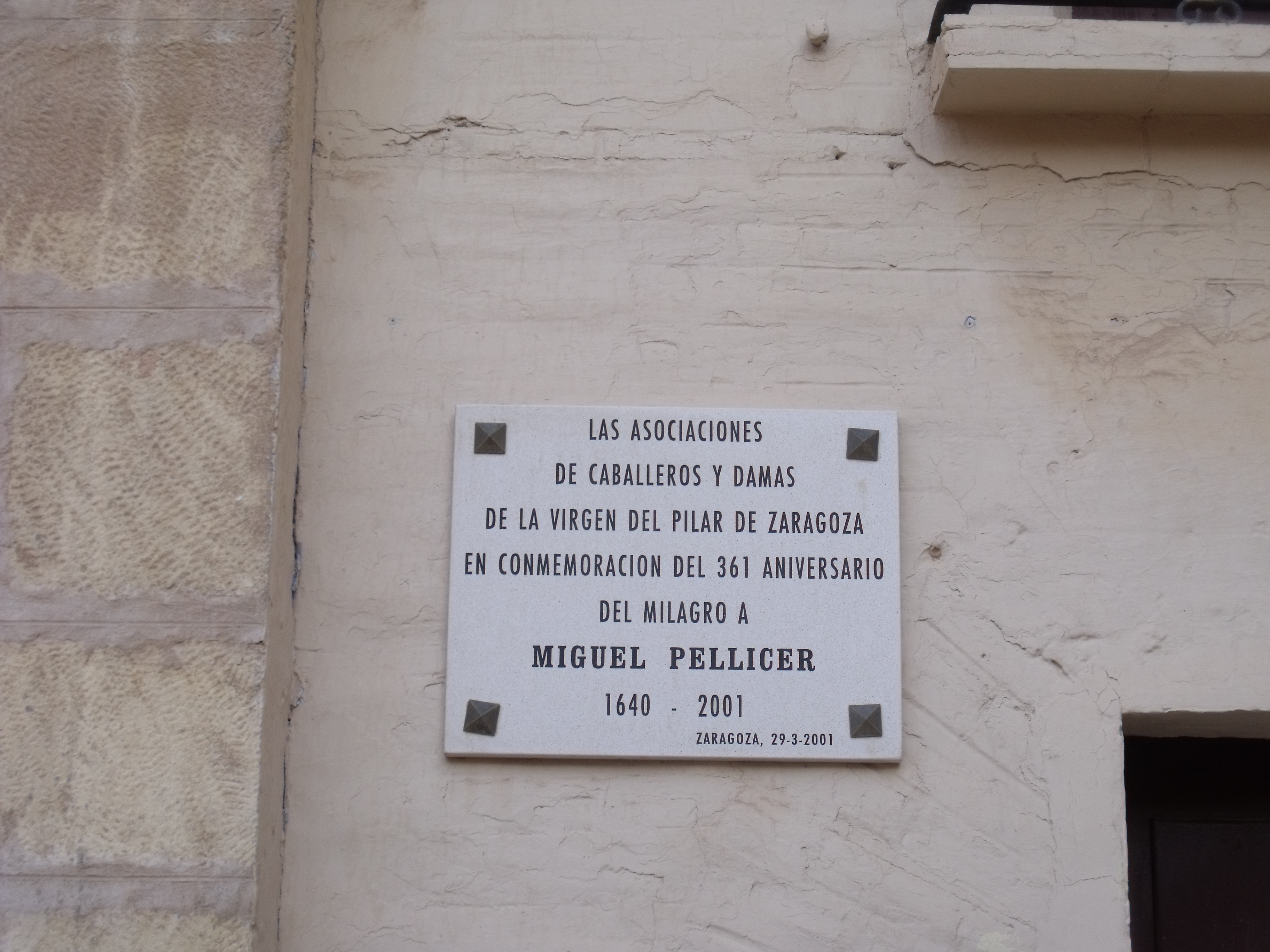 Calanda